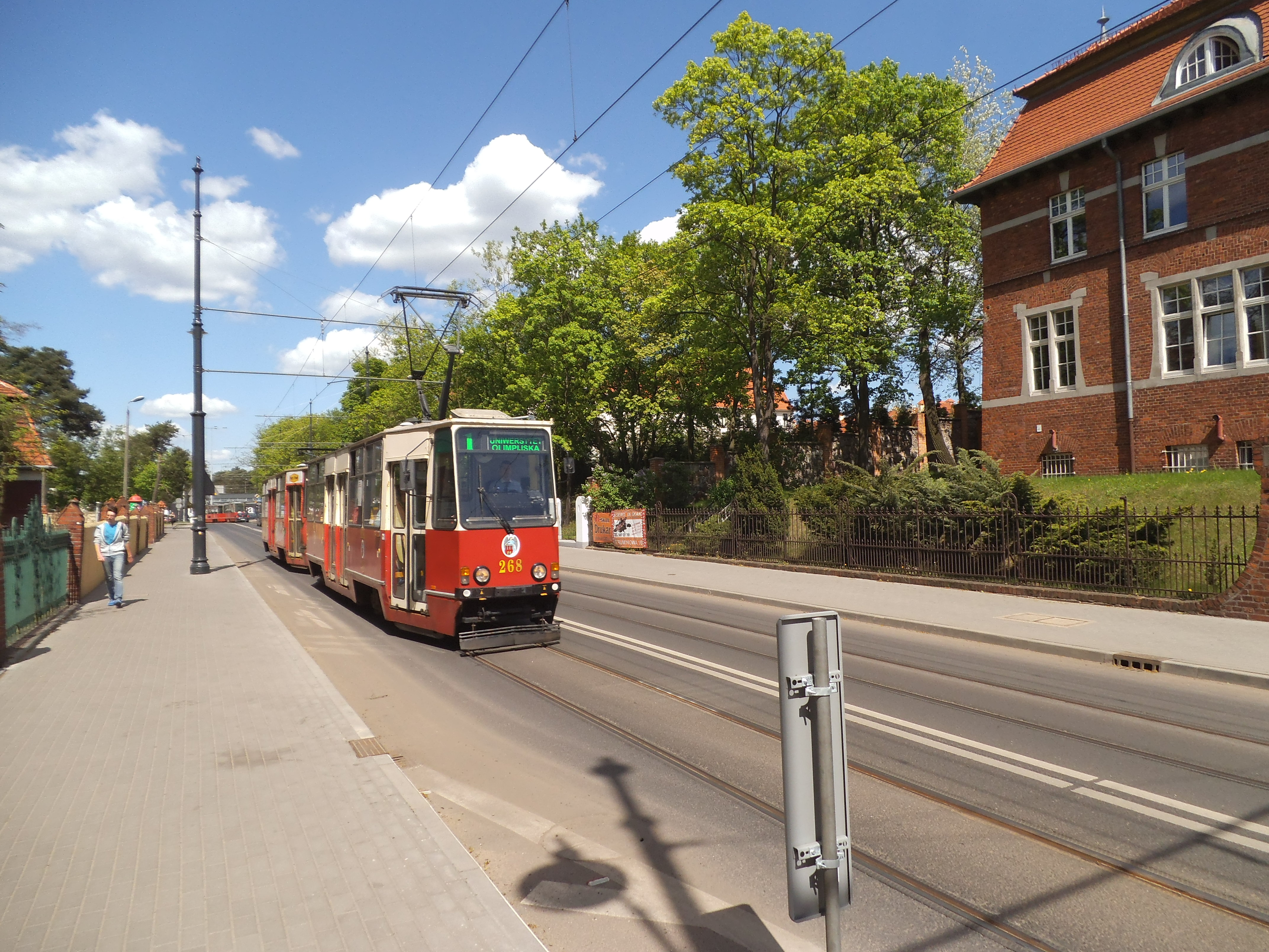 Torowisko na ulicy Sienkiewicza w Toruniu